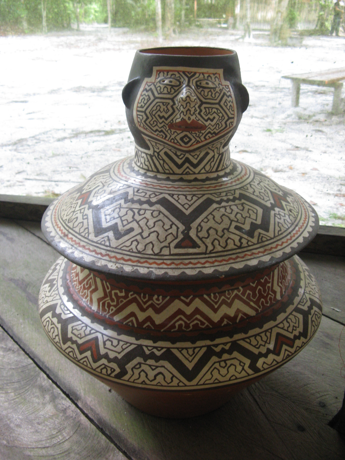 Керамика. Племя Шипибо-Конибо.